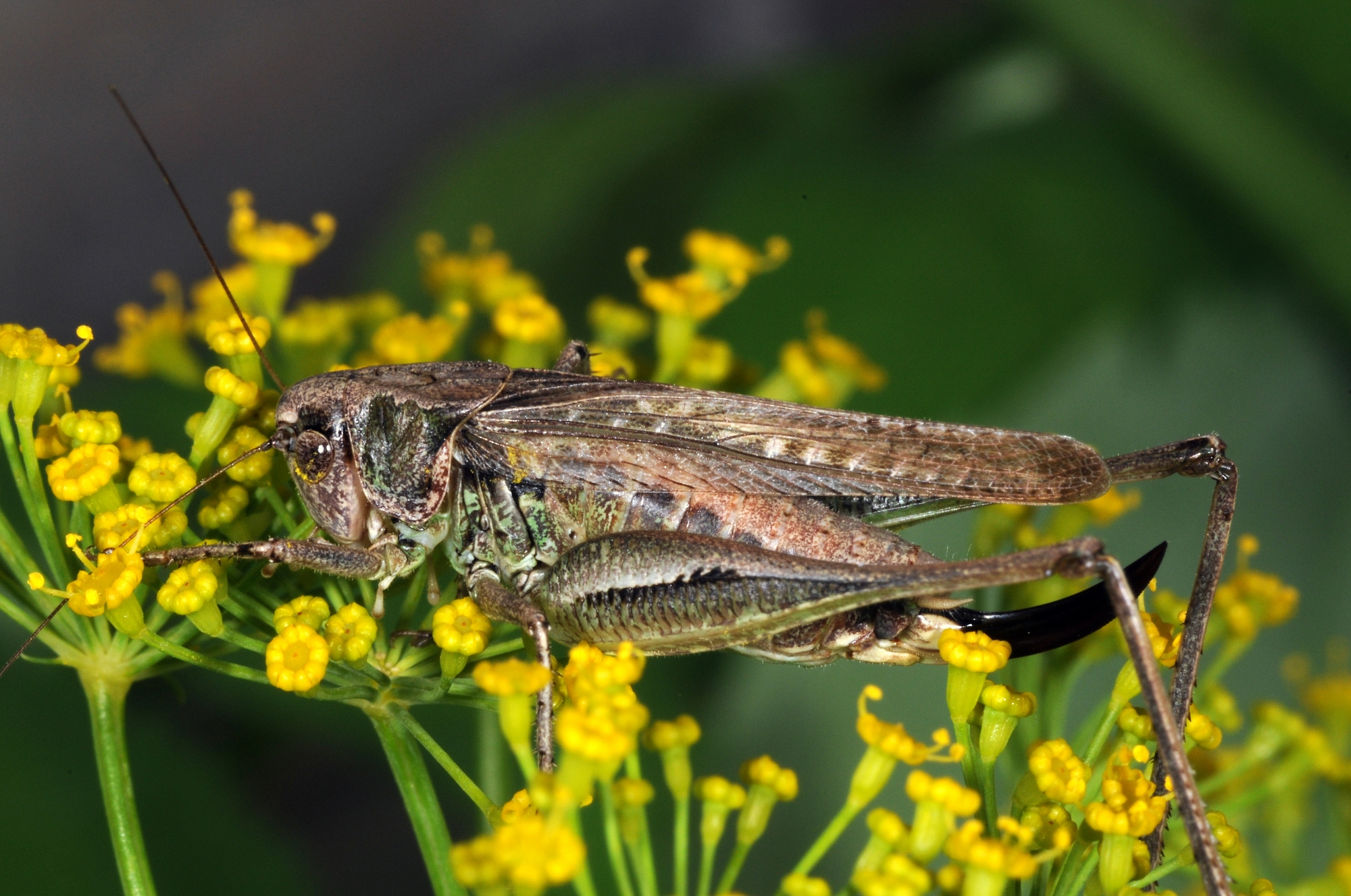 Platycleis albopunctata, Weibchen, Mainzer Sand, Rheinland-Pfalz, Deutschland